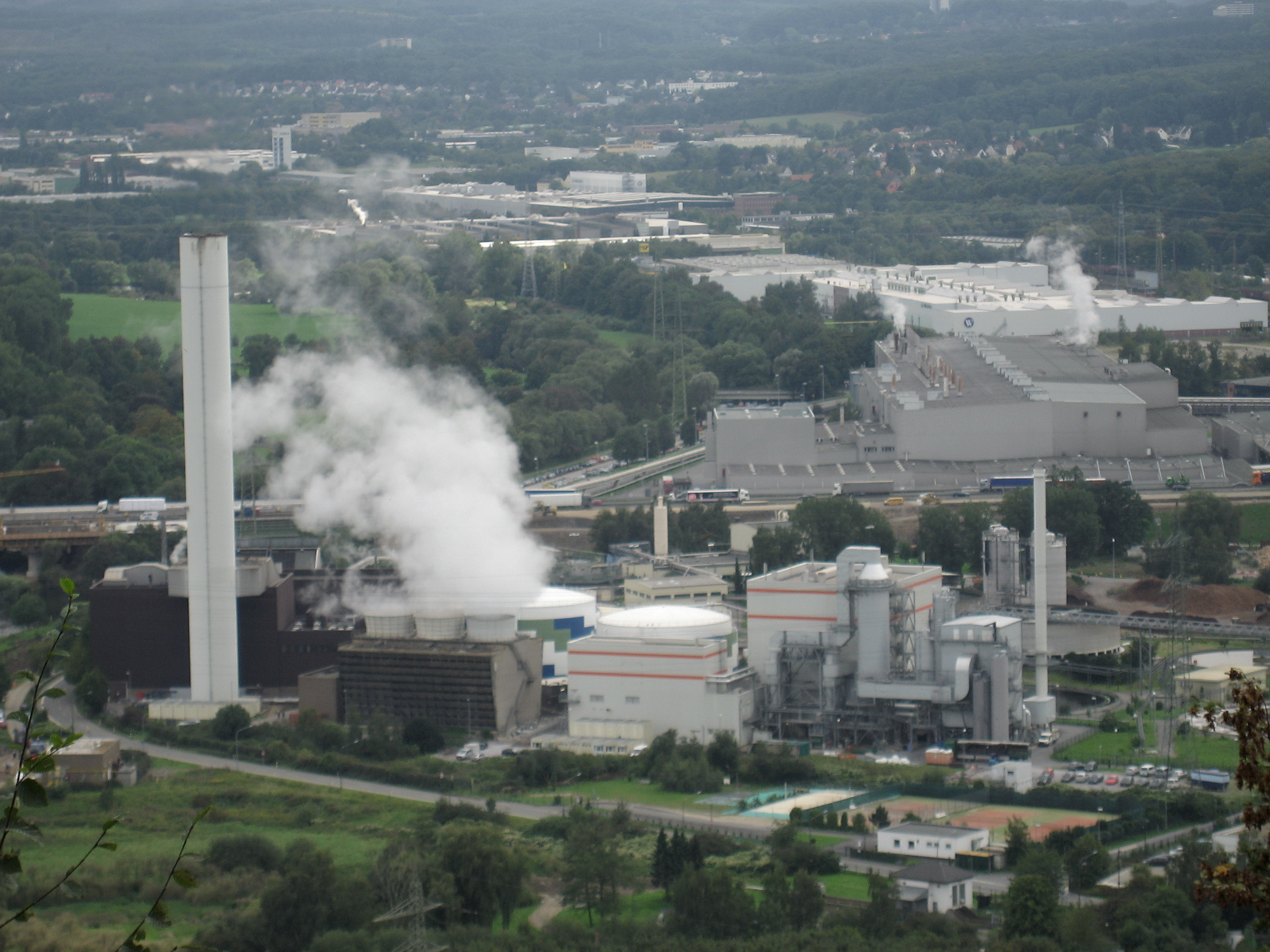 Dortmund, Syburg, Blick von der Hohensyburg ins Ruhrtal Richtung Hagen; Heizkraftwerk Hagen-Kabel (Vordergrund), Stora-Enso-Werk (rechts dahinter)